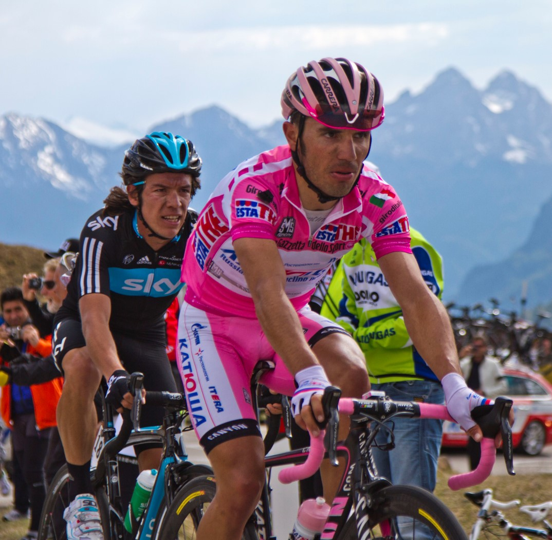 giau 140 rodriguez uran